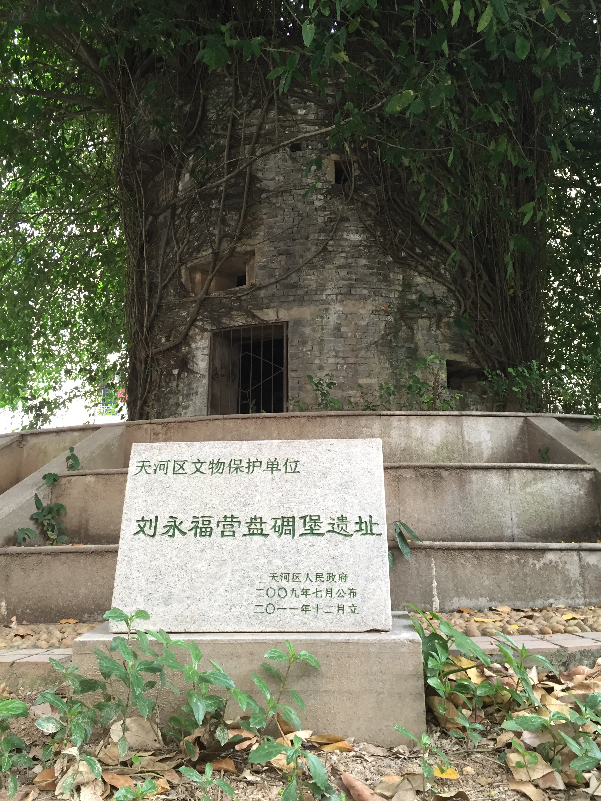 位于华南理工大学北区宿舍楼下。始建于清代，为刘永福黑旗军四营碉堡。碉堡外为青砖灰砂，高5米。直径5.6米，被榕树气根所包围。2009年7月公布为天河区第一批文物保护单位。